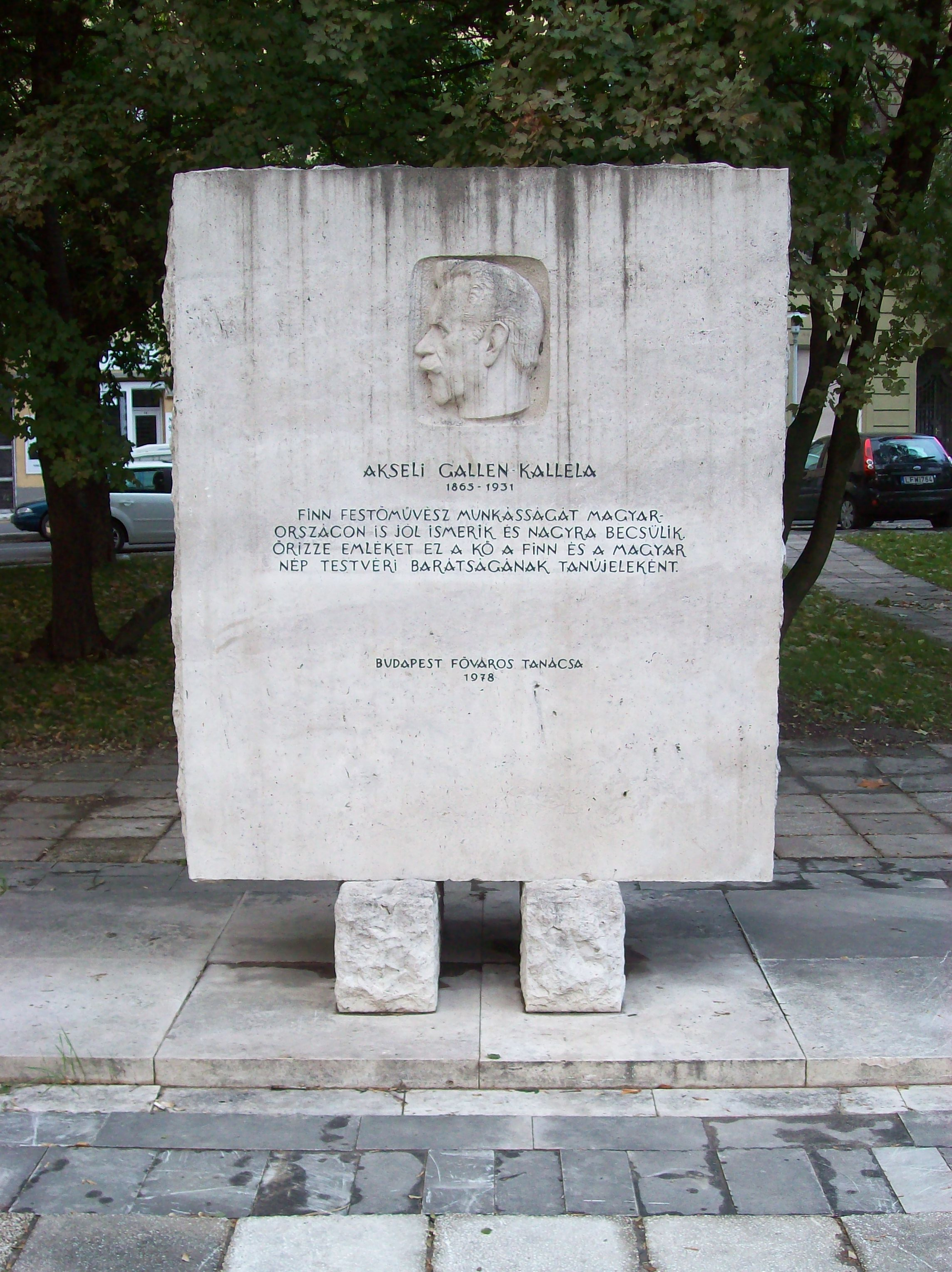 Akesli Gallen Kallela emlékműve a Lánchíd utcában (Budapest, I. ker.)